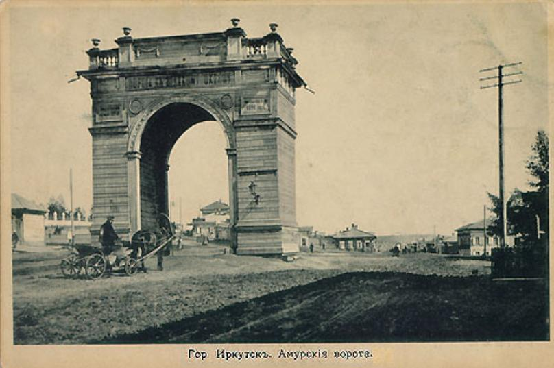 г. Иркутск. Амурские ворота.